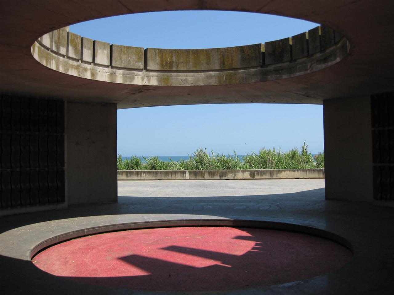 Ossario Commemorativo dei Caduti Slavi, costruito nel cimitero di Barletta alla fine degli anni sessanta su iniziativa del Sindaco Michele Morelli ed inaugurato il 4 luglio 1970. Progettato dallo scultore Dušan Džamonja, Custodisce i resti di 825 morti e di altri 463 combattenti dei quali non erano state reperite le spoglie, per un totale di 1288 caduti slavi. Di grande impatto è l'apertura circolare nel pavimento della sala principale, rivestito da un mosaico di colore rosso vivo per simboleggiare il sangue versato dai combattenti jugoslavi in occasione della resistenza antifascista e antinazista italiana.